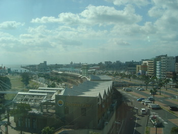 NHK鹿児島支局から見た鹿児島本港区ドルフィンポート